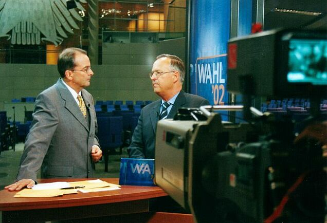 Hans Eichel (rechts) am 22. September 2002, dem Tag der Bundestagswahl, abends im Reichstagsgebäude des Bundestages vor dem Plenarsaal bei einem Interview für den Fernsehsender Phoenix.